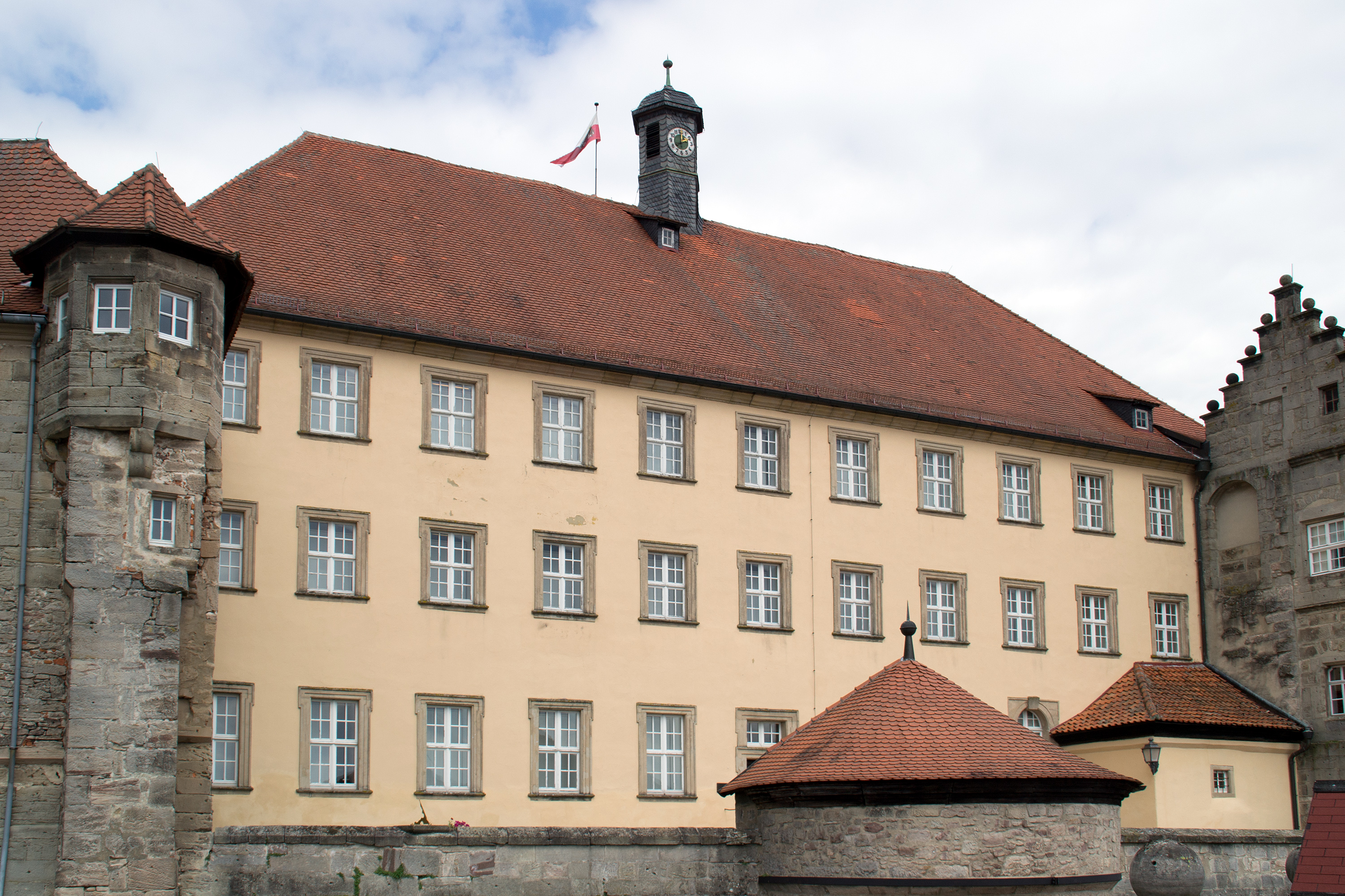 Der sogenannte Kommandantenbau auf der Festung Rosenberg in Kronach. Das Gebäude wurde von Balthasar Neumann in den Jahren 1730–33 anstelle eines älteren Gebäudes errichtet.